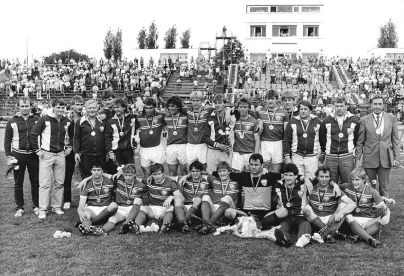 ADN-ZB-Link-1.6.85-zin-Berlin: Fußball-Oberliga. Mit Torrekord zum siebenten Titel. Mit der feierlichen Meisterehrung für den BFC Dynamo fand die Fußball-Oberliga-Saison 1984-85 vor 8000 Zuschauern im Berliner Jahn-Sportpark einen stimmungsvollen Abschluß. Nach dem mit 2:1 (1:0) gegen den FC Vorwärts Frankfurt-Oder gewonnenen Spiel stellte sich der nunmehr siebenfache Titelträger, der mit 90 Treffern auch einen neuen Oberliga-Torrekord aufstellte, den Fotoreportern.